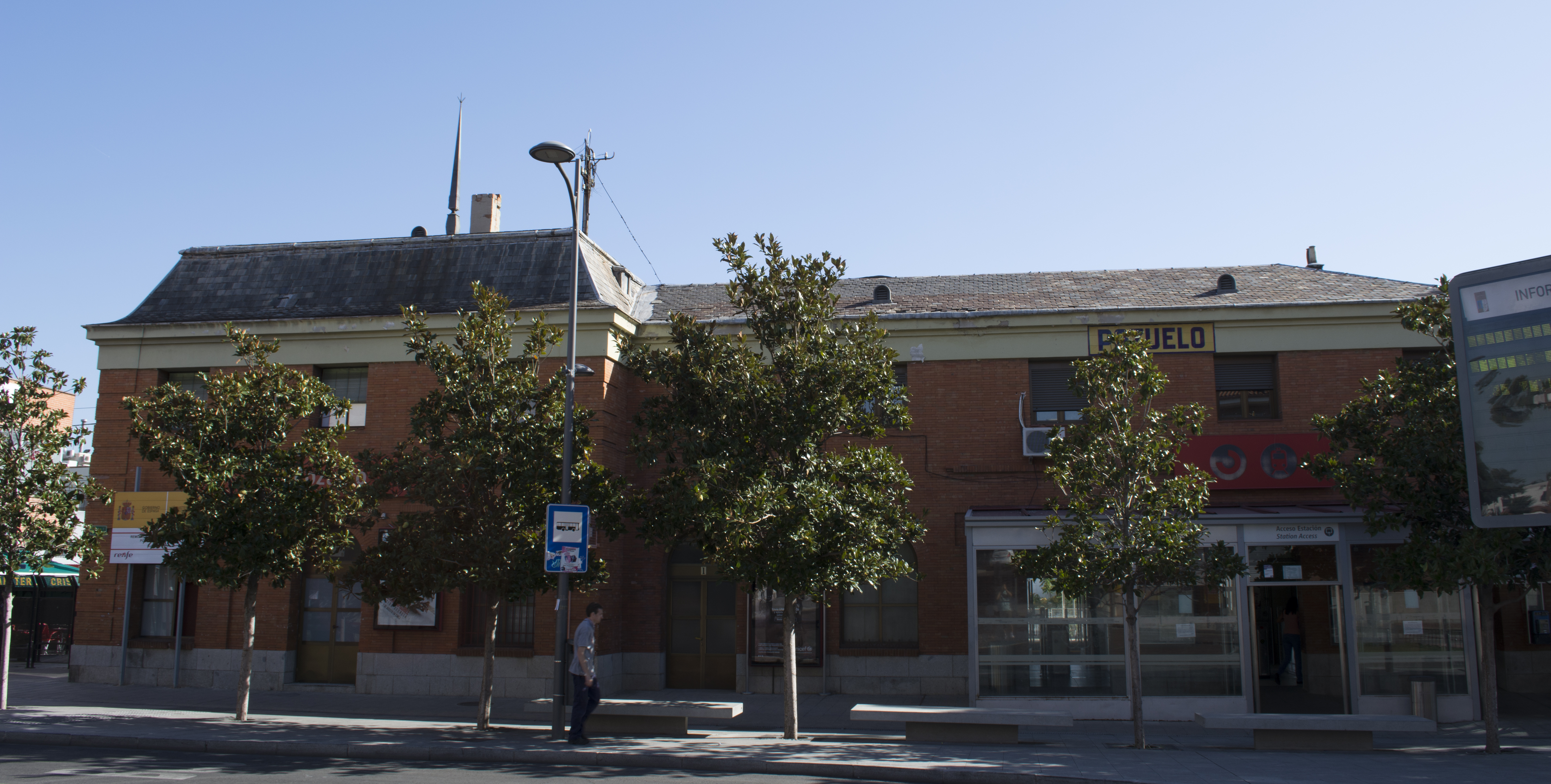 Exterior de la estación de tren de Pozuelo, desde la rotonda en la que confluyen las calles Antonio Díaz, de la Estación y Carretera de Húmera (Pozuelo de Alarcón, Comunidad de Madrid).